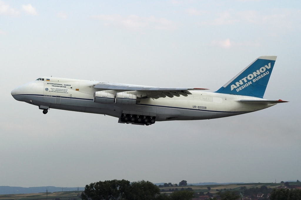 Antonov An-124 UR-82008 der Antonov Airlines